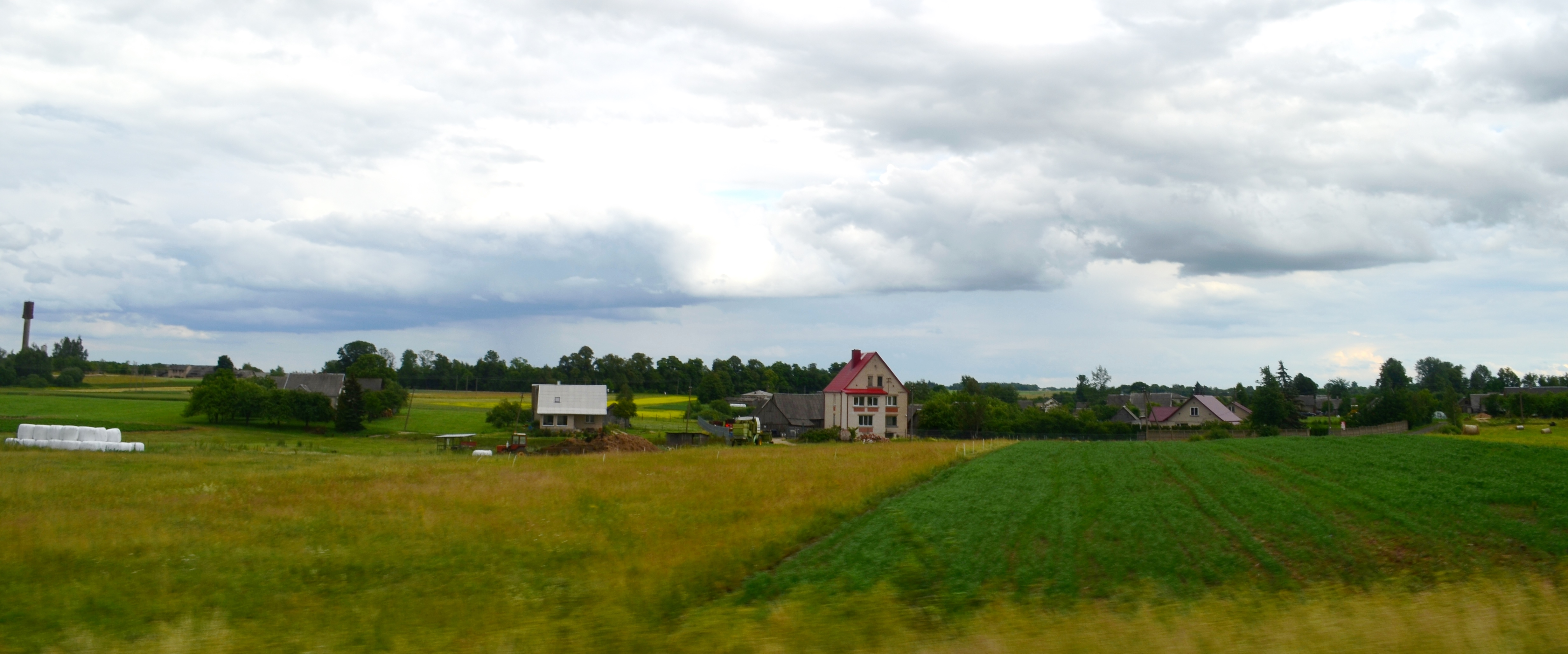 Vėžionys, Prienų raj.